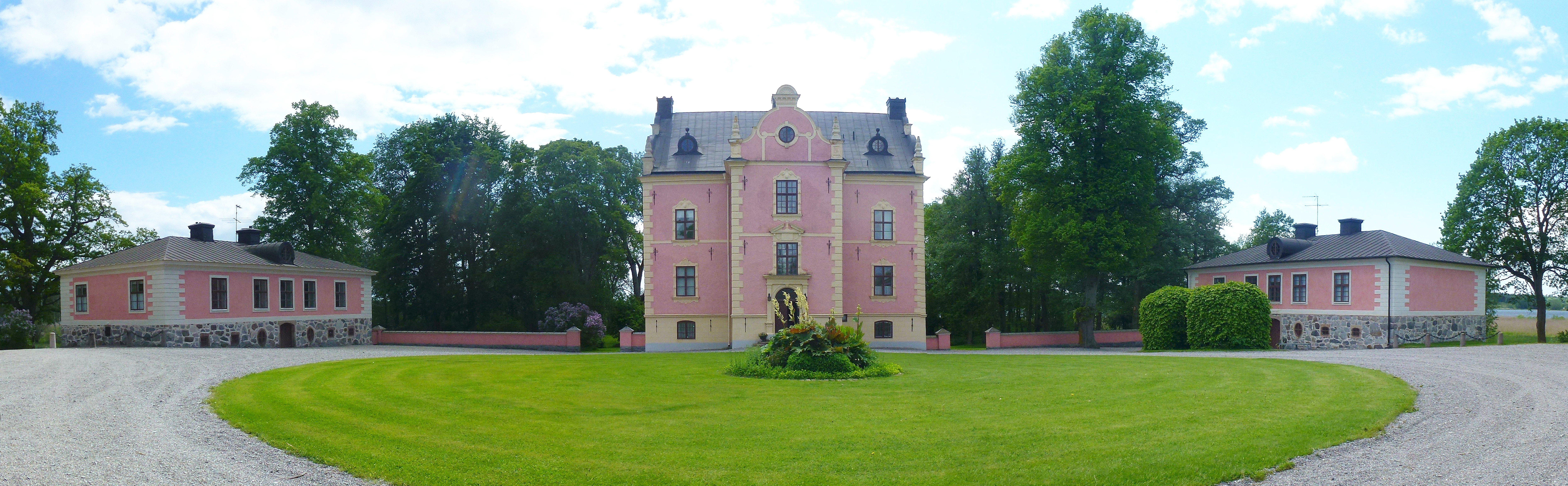 Skånelaholm med inre flyglarna